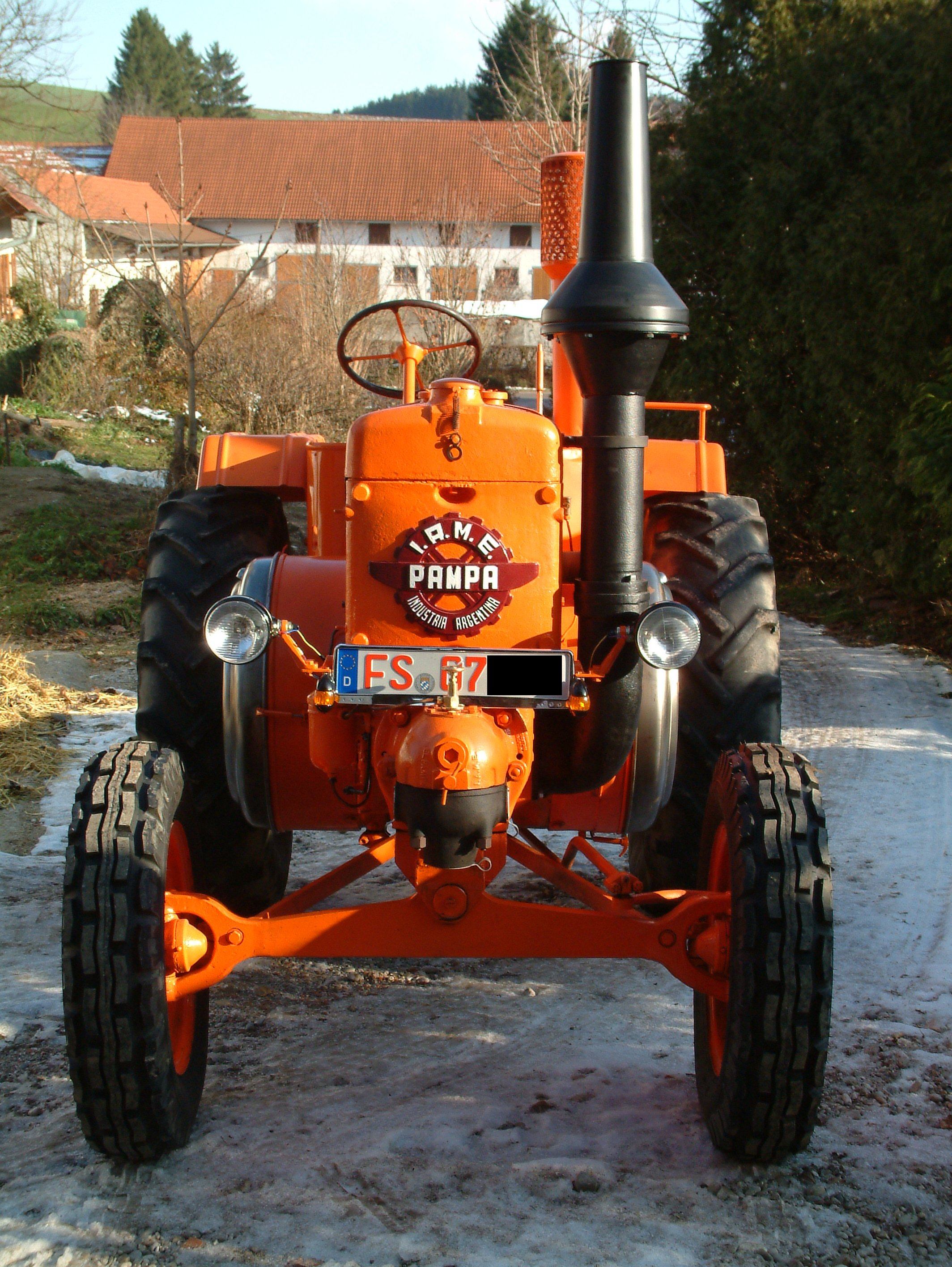 Restaurierter I.A.M.E. Pampa T01 Glühkopfbulldog, Baujahr 1952, von vorne